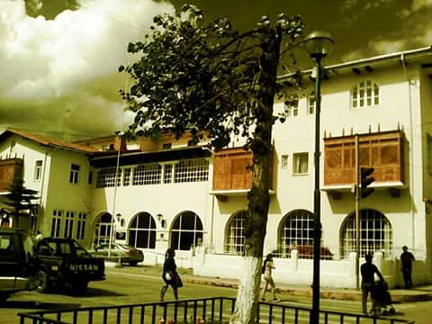 La imagen representa un atardecer en el centro de Huancayo - Huancayo - Junín, ésta imagen fue grabada en mi memoria porque representa un día especial, una hermosa Arquitectura en frente de la Plaza Huamanmarca, con el tiempo exacto para representarlo.